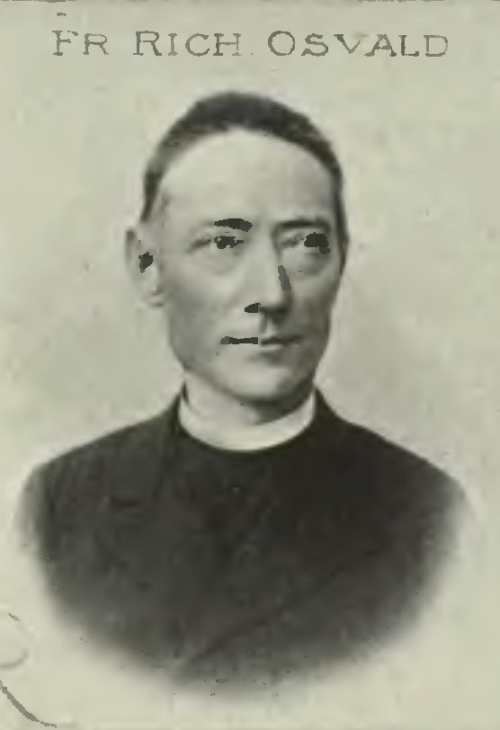 Portrét – Richard Osvald (1845 - 1926), Slovenský a český římskokatolický kněz.